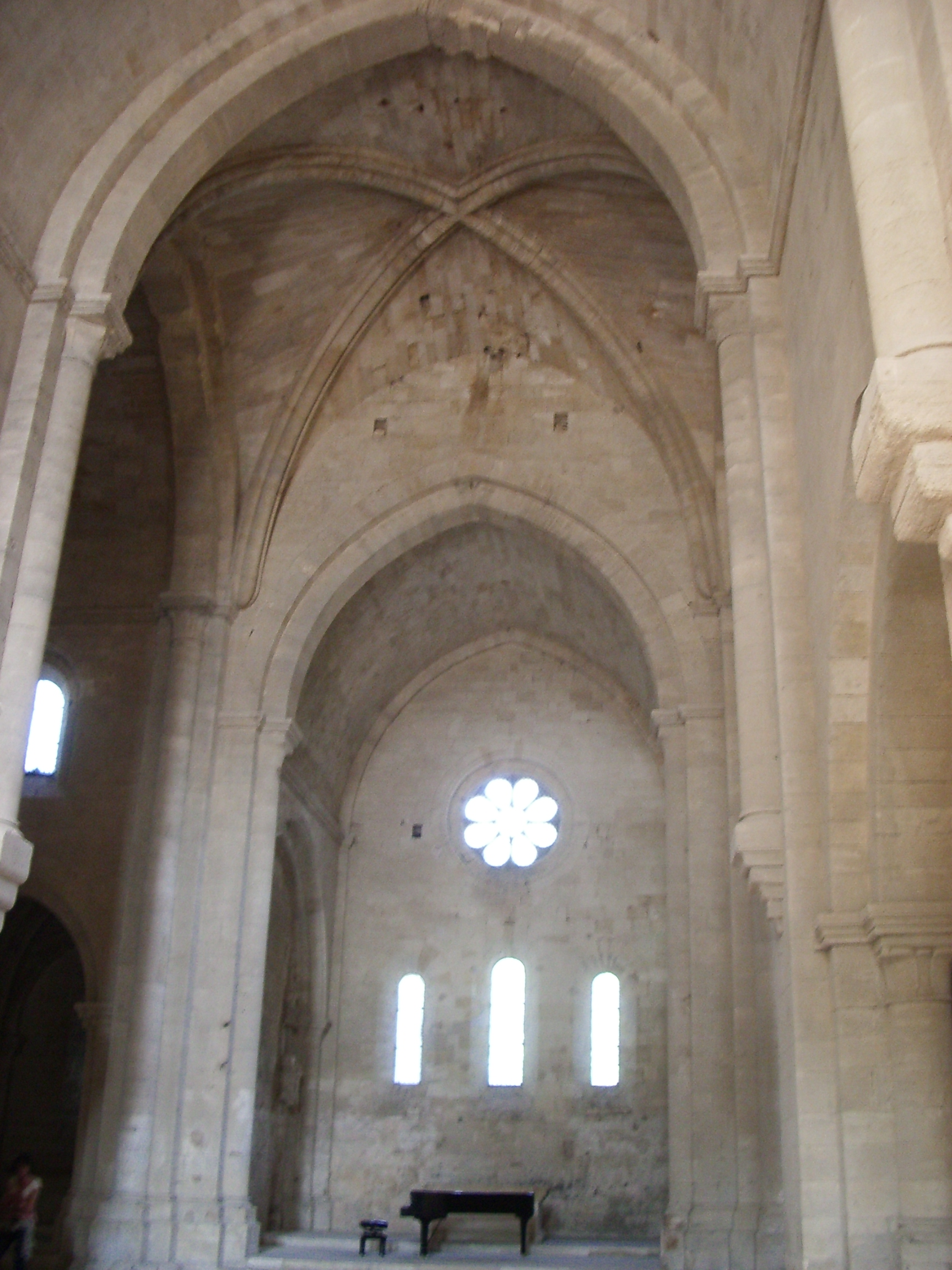 Abbaye de Silvacane / Silvacane Abbey - Provence, France